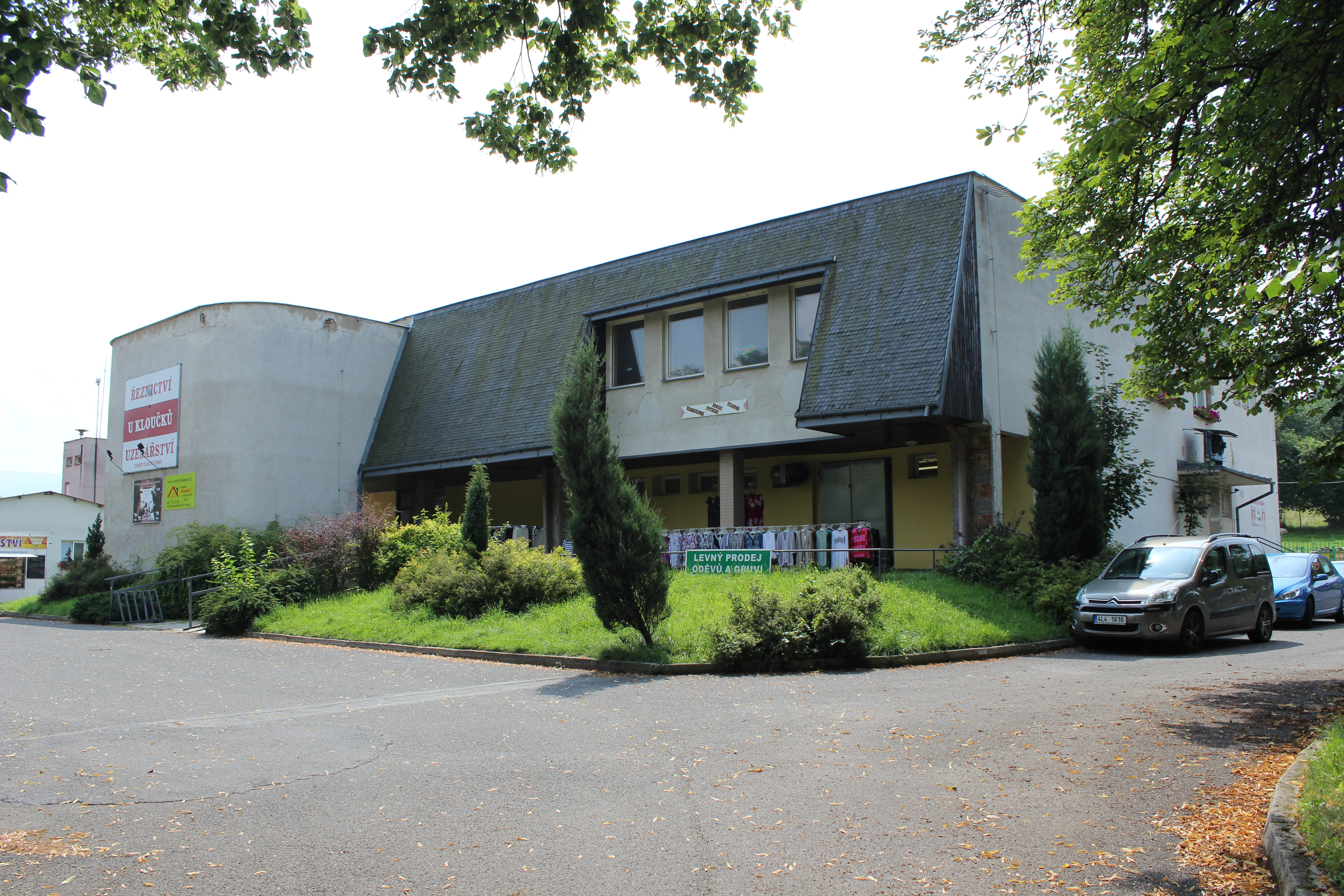 Dům číslo popisné 647 v Raspenavě.